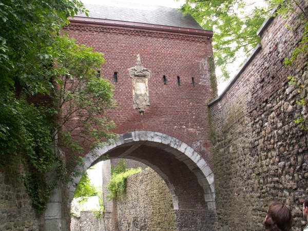 Pont fortifié de la Chartreuse de Liège (XVIIe siècle, restauré à la fin du XXe siècle). Ce pont permettait le passage de la ferme conventuelle aux terres de culture des Chartreux. L'analyse dendrochronologique nous indique que l'arbre constituant l'entrait a été abattu entre 1594 et 1604, celui formant le linteau a été coupé après 1656 (source : Laboratoire de dendrochronologie de l'université de Liège).